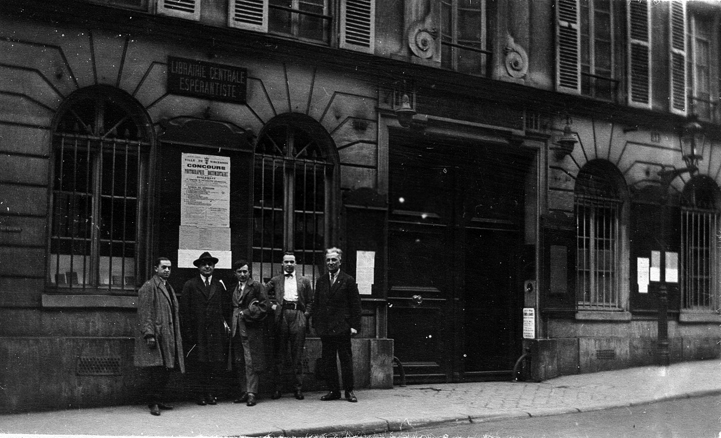 Grupo de esperantistoj antaŭ Esperantista Centra Librejo en Parizo, majo 1925. La unua maldekstre: Salomon Kornfeld (Grenkamp).